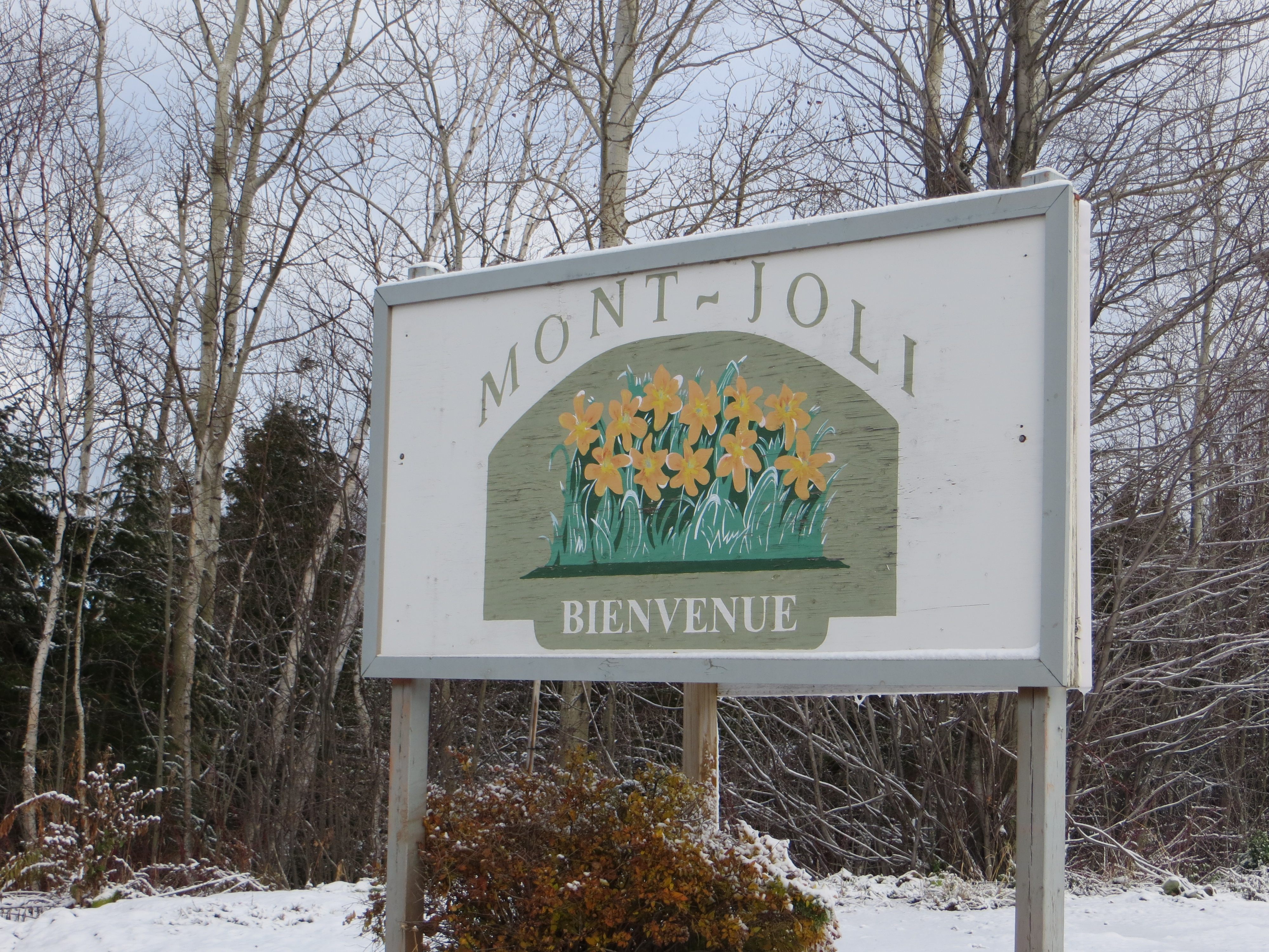 Aviso de bienvenida de Mont-Joli.